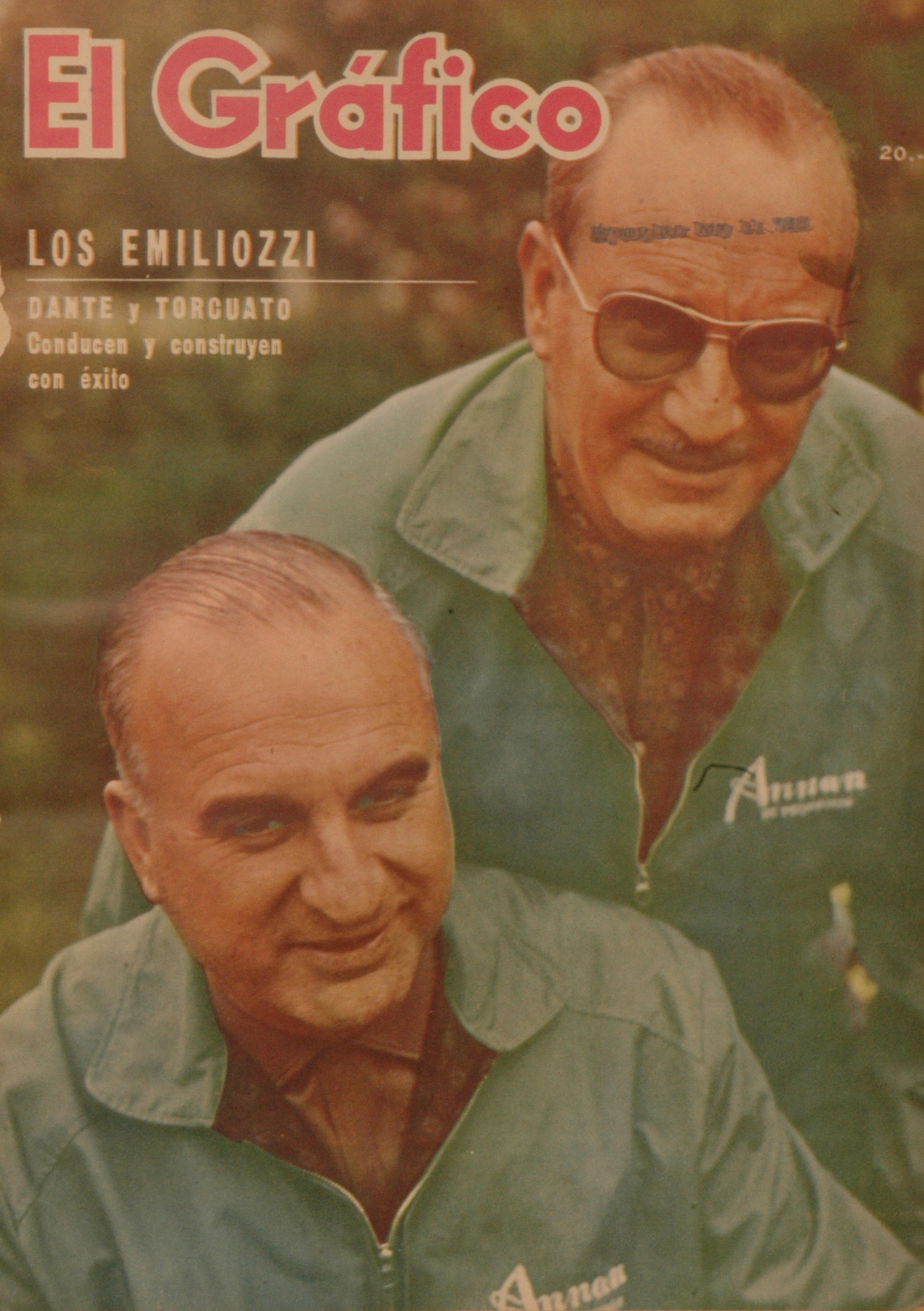 El Grafico del 22 de Abril de 1964. Edicion 2324